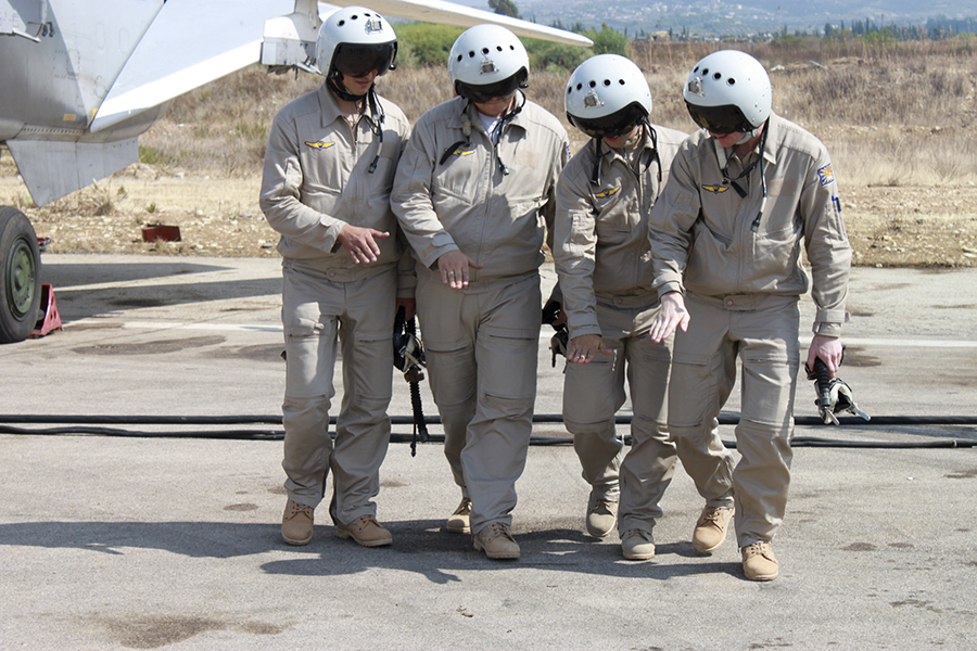 Боевая работа российской авиации в Сирии